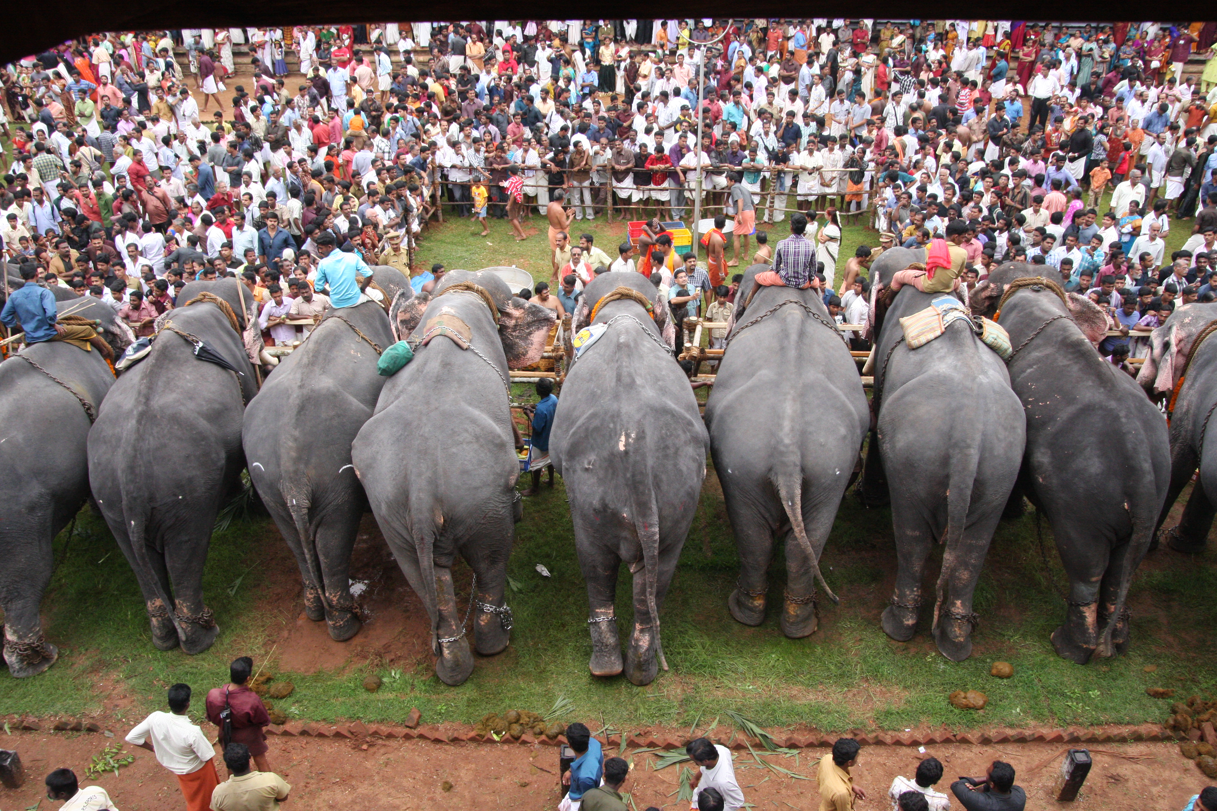 This media file is uploaded with Malayalam loves Wikimedia event - 3.